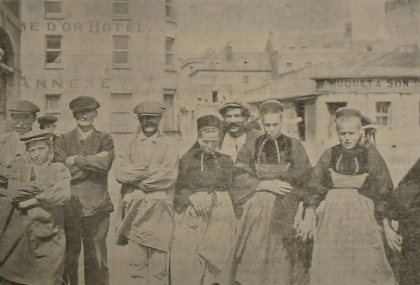 Nrf: D'la Vielle Chronique, Jèrri